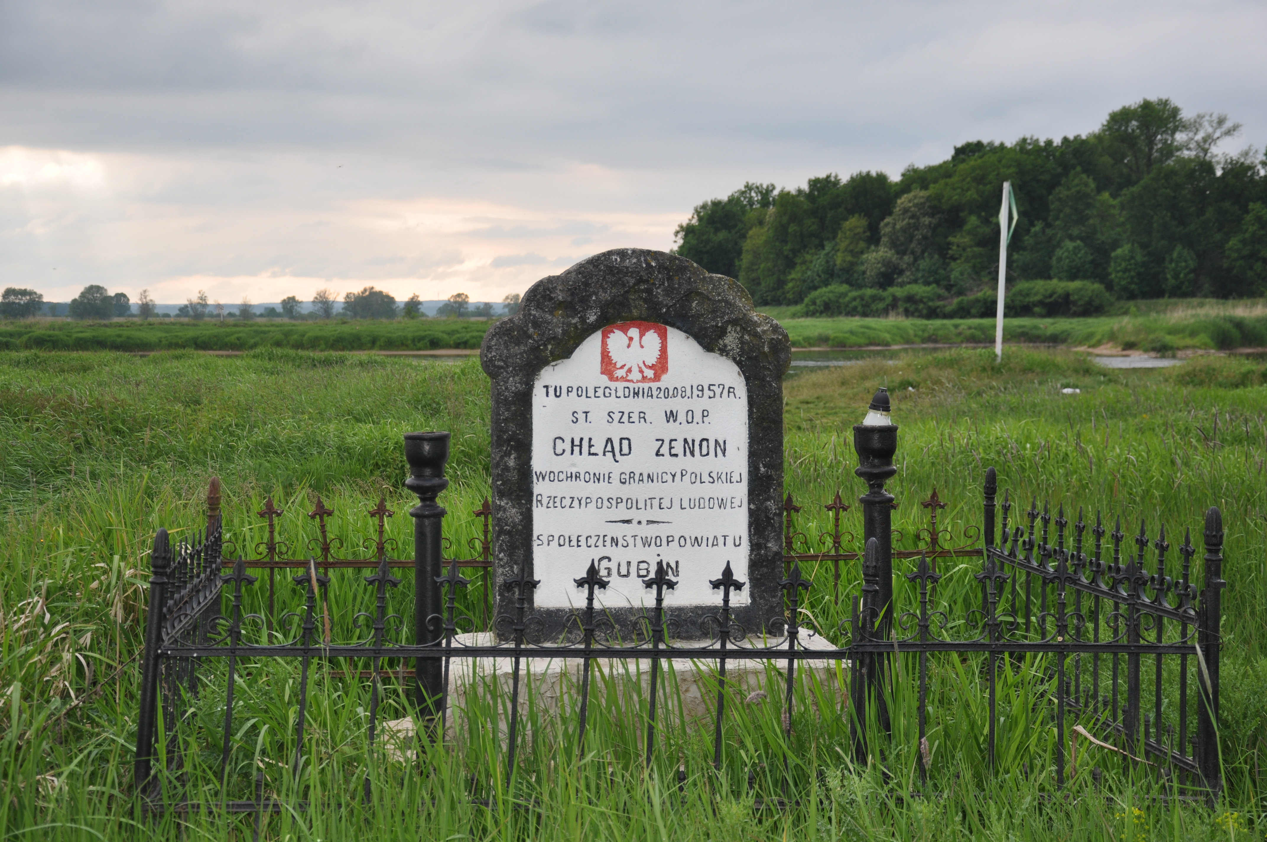 Miejsce śmierci szer. Chłąda